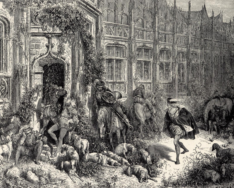 Illustration for Charles Perrault's La Belle au Bois Dormant from Histoires ou Contes du Temps passé: Les Contes de ma Mère l'Oye (1697). Gustave Doré's illustrations appear in an 1867 edition entitled Les Contes de Perrault. Fourth of six engravings